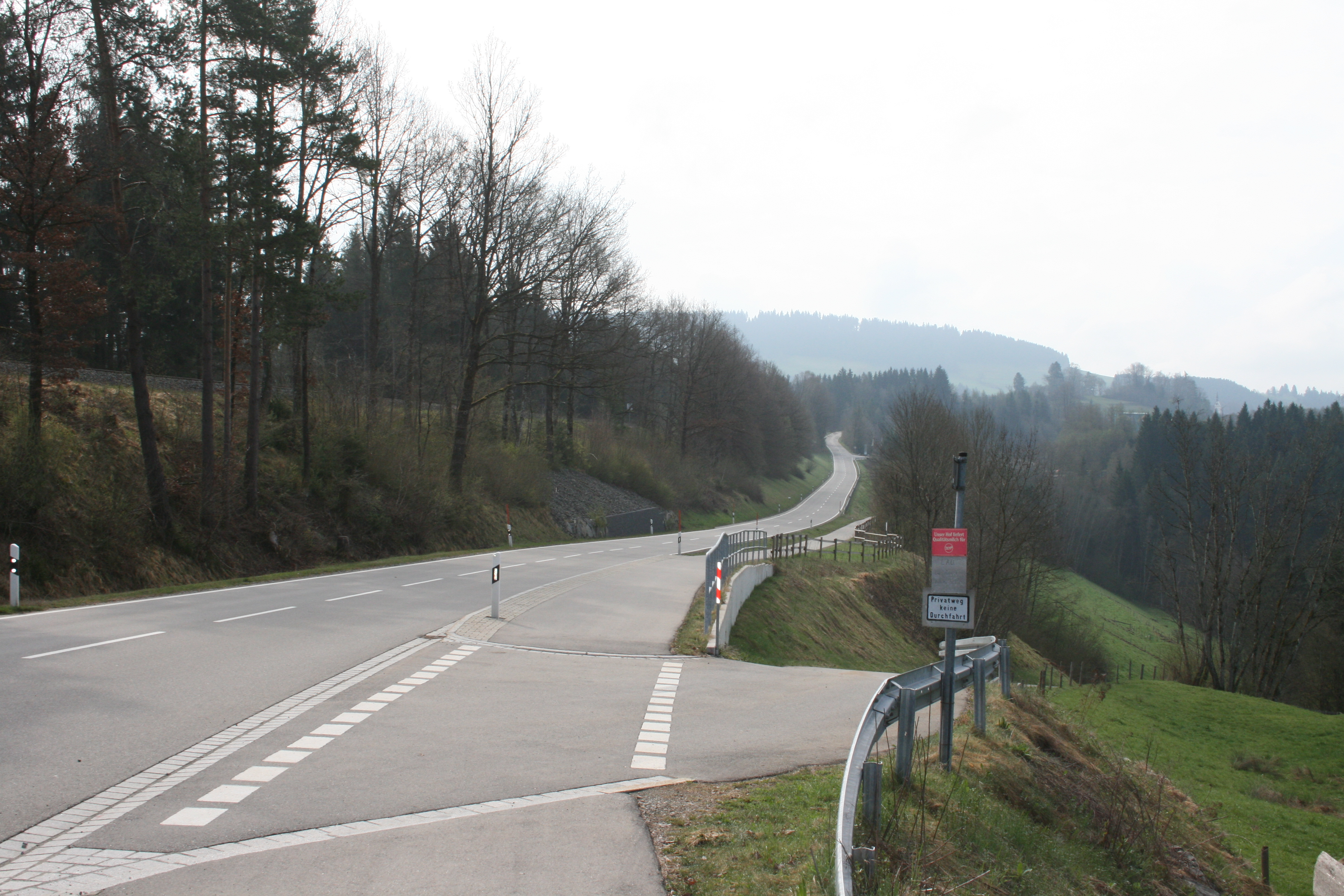 Rentershofener Bahndamm